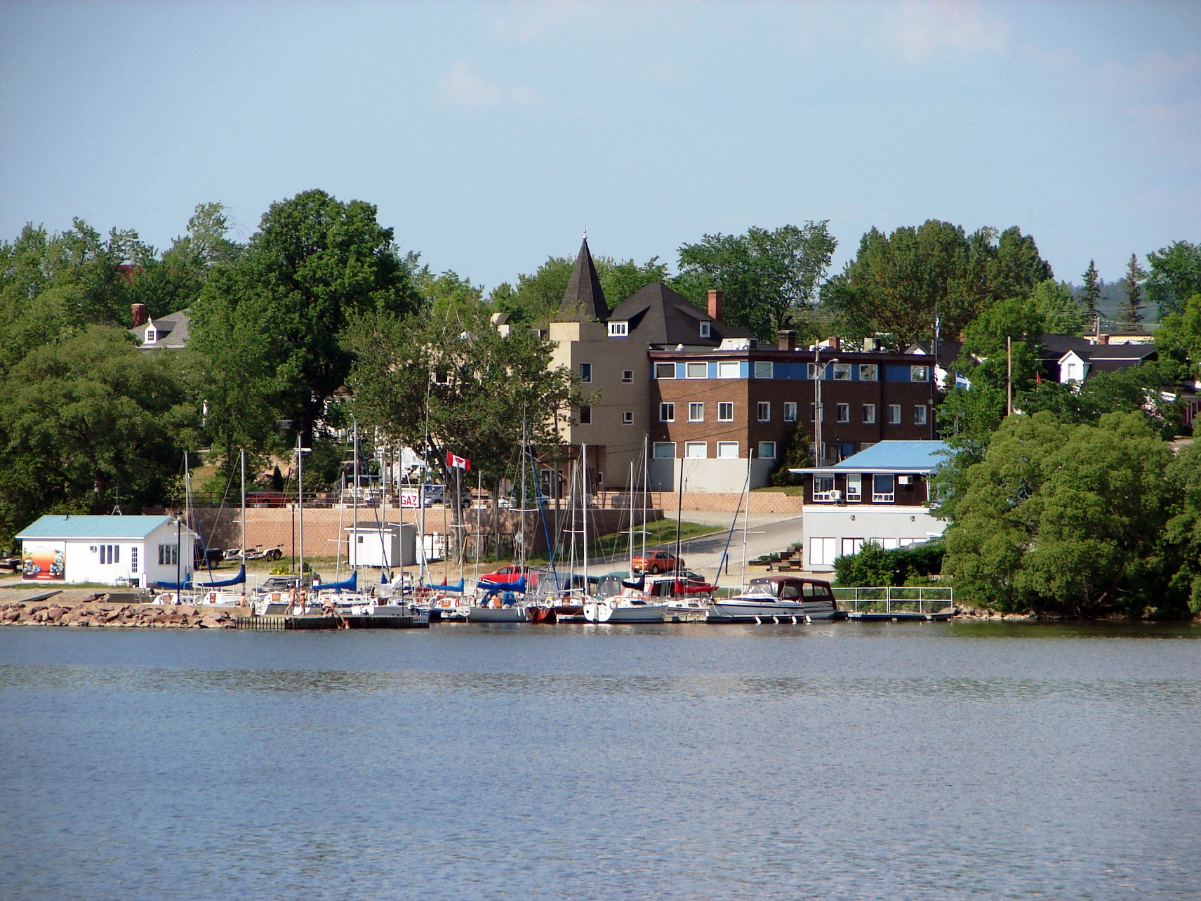 Ville Marie, Quebec, Canada